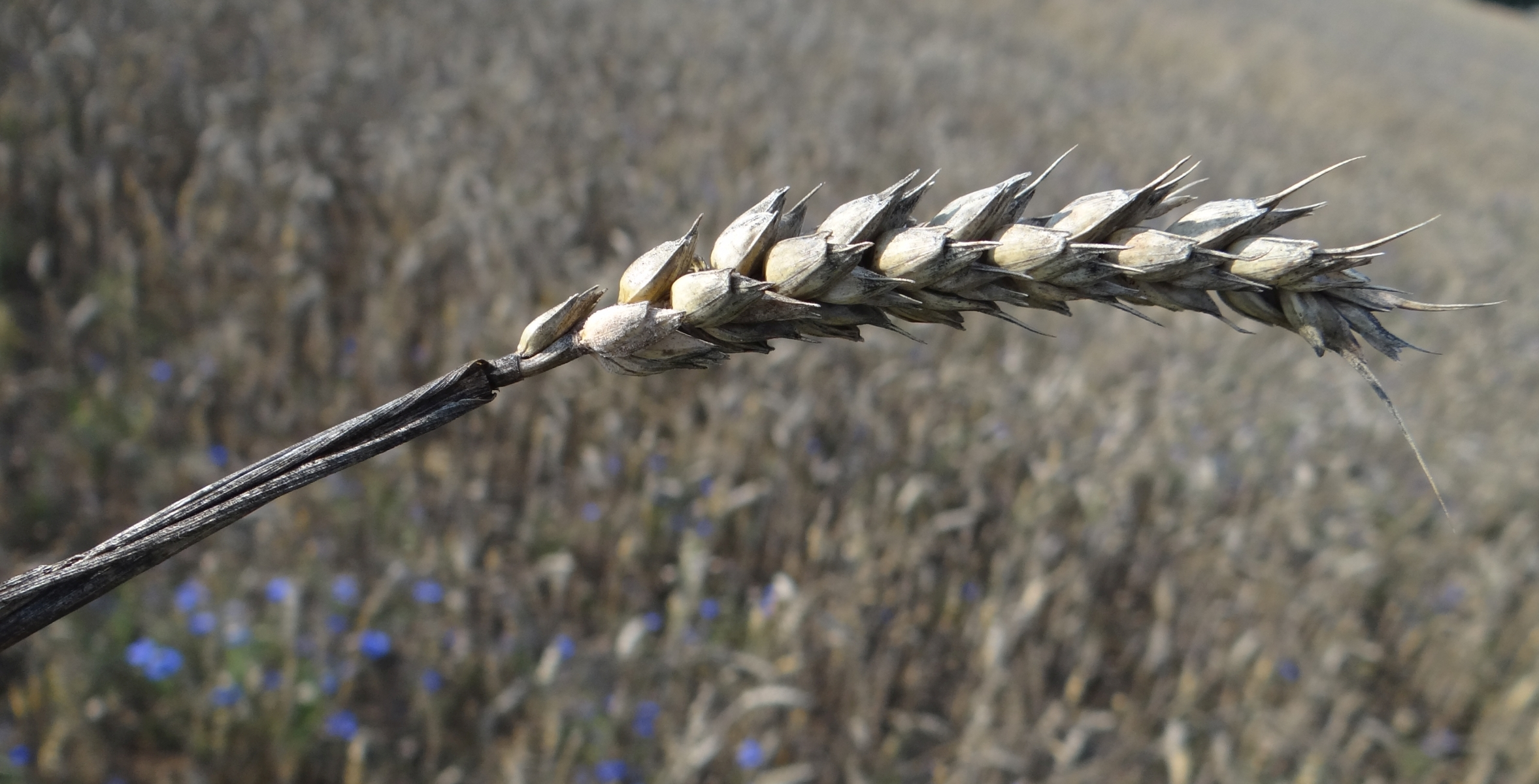 Disease of Triticum vulgare. (Cladosporium, Alternaria, Epicoccum)